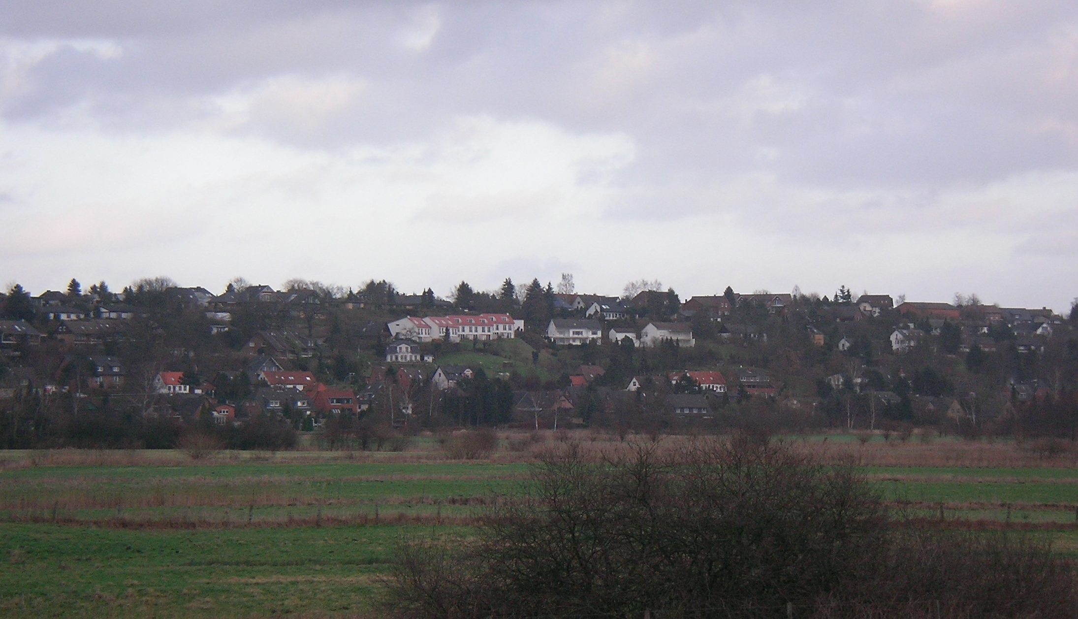 Escheburg bei Hamburg im Winter 2007